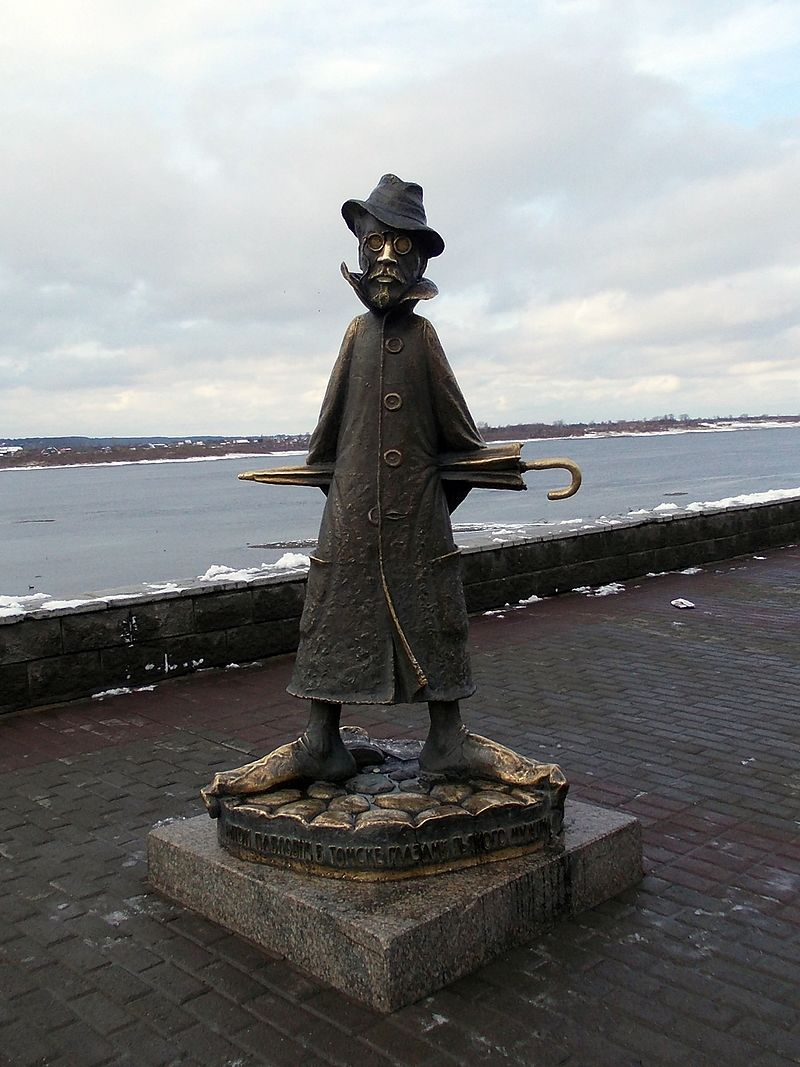 Памятник Чехову (Томск)